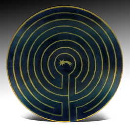 Labyrinth, mit dem Bradford-Kunstpreis ausgezeichneter Sammelteller-Entwurf